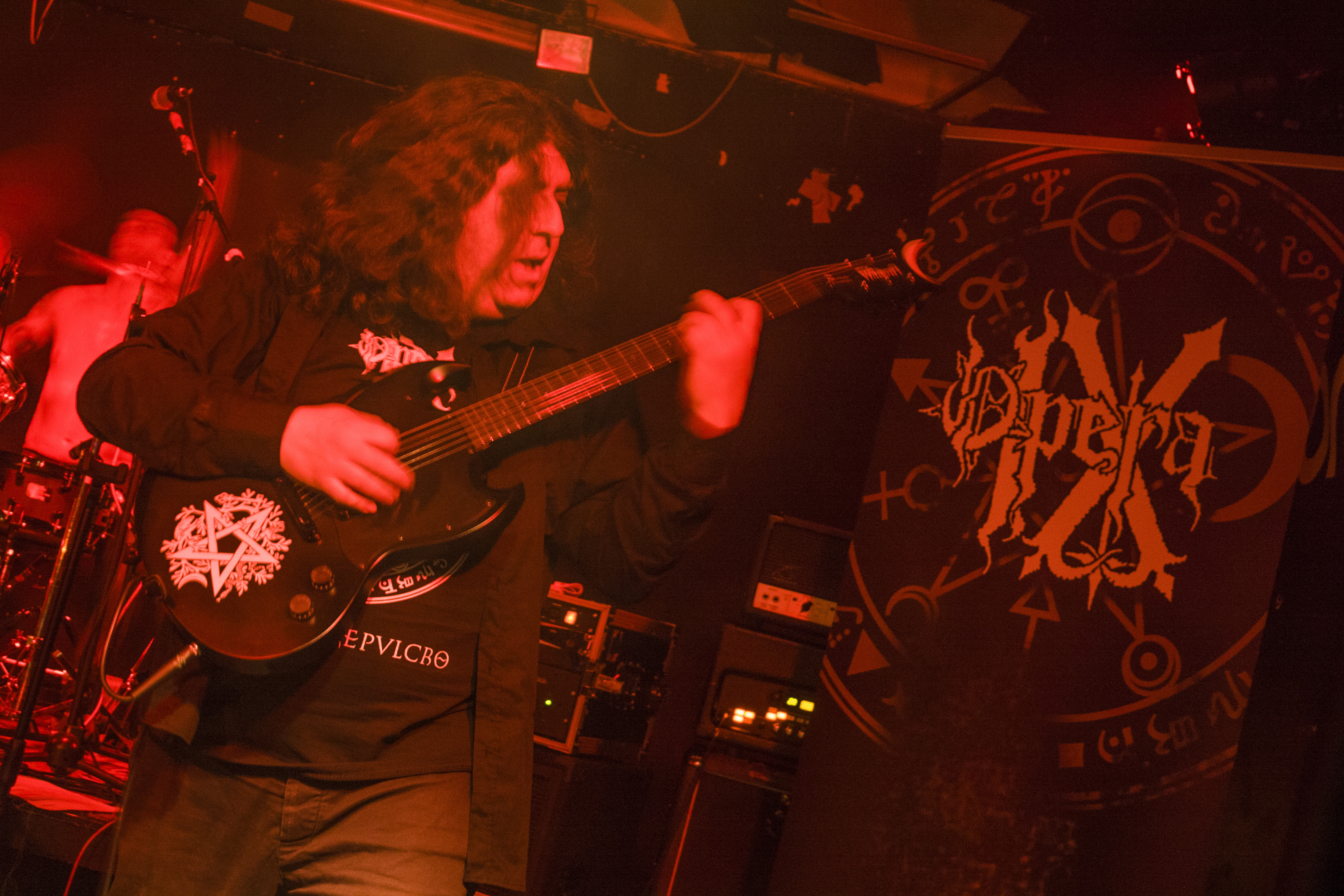 Opera IX - Ossian